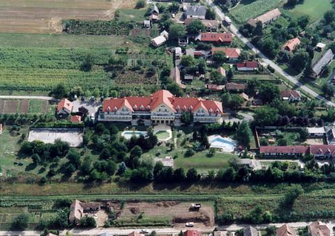 Nagyberény, Hungary, aerialphotography